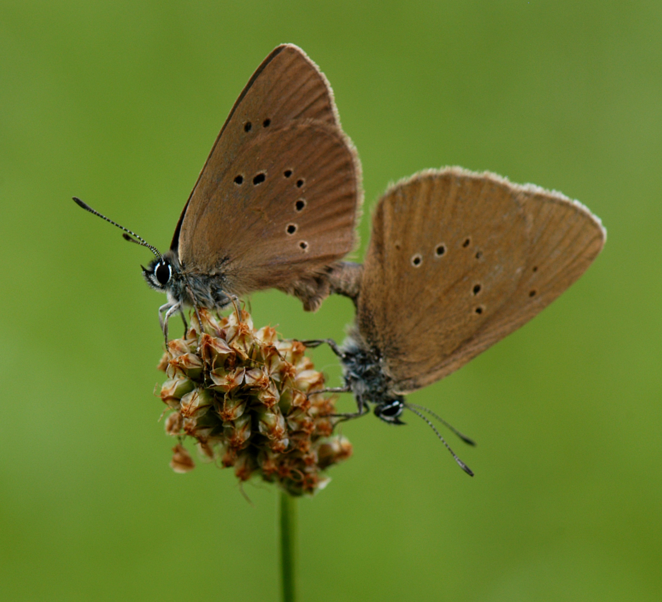 Couple Azurés des Paluds